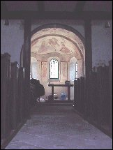 Kapelle innen Malerei Rupelrath